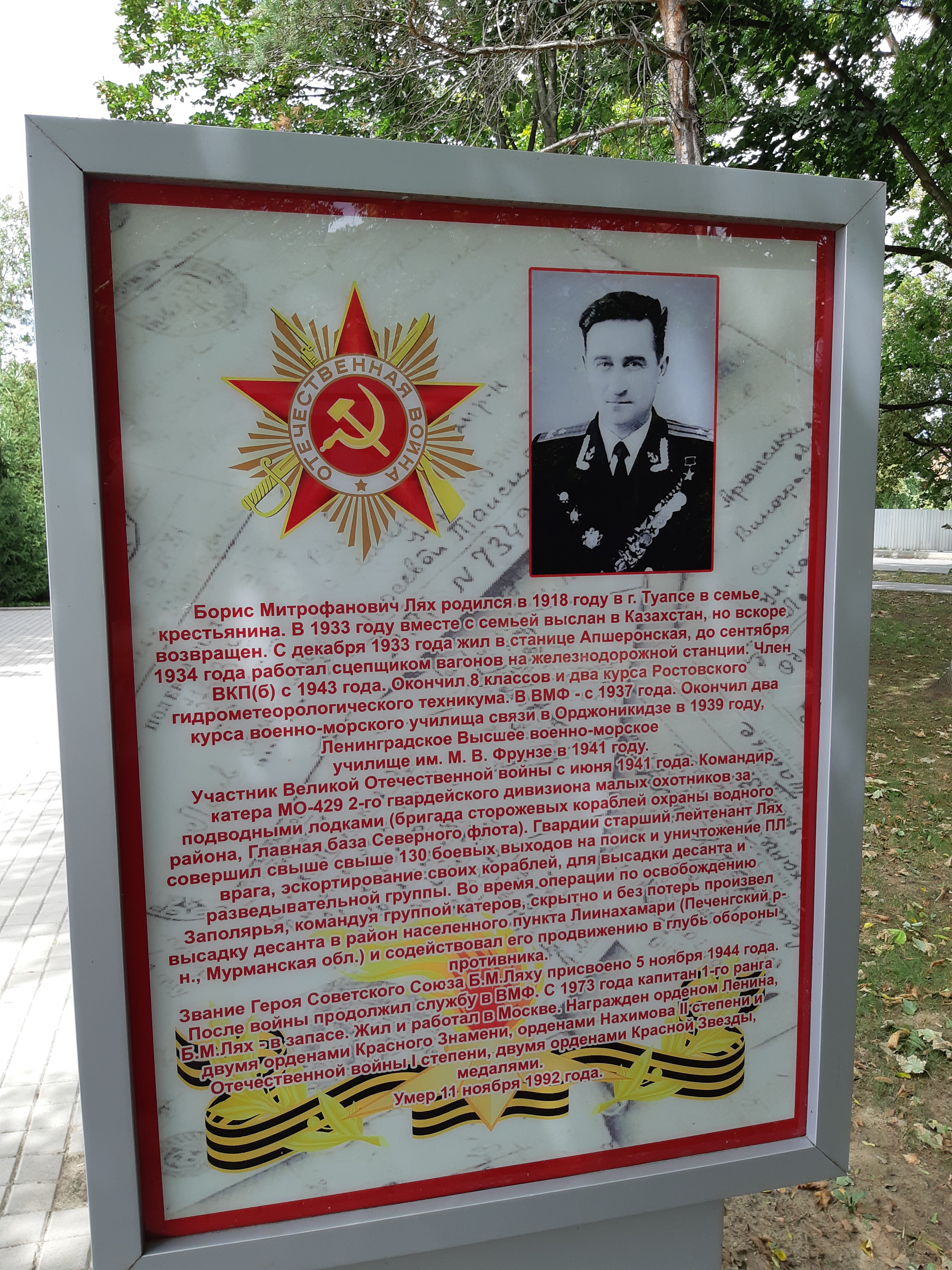 Лях Борис Митрофанович